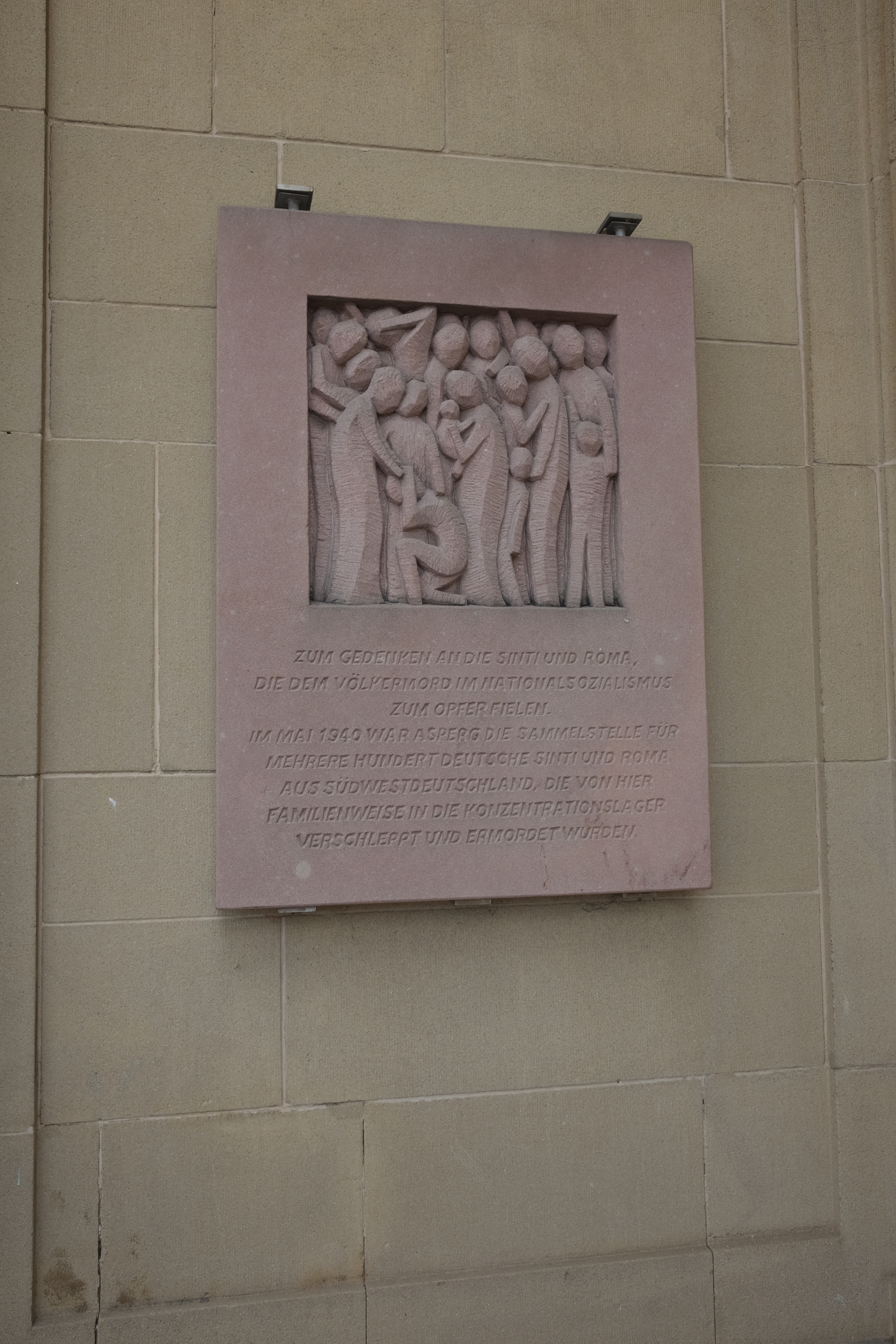 Denkmal für die ermordeten Sinti und Roma während des Nationalsozialismus am Asperger Bahnhof.